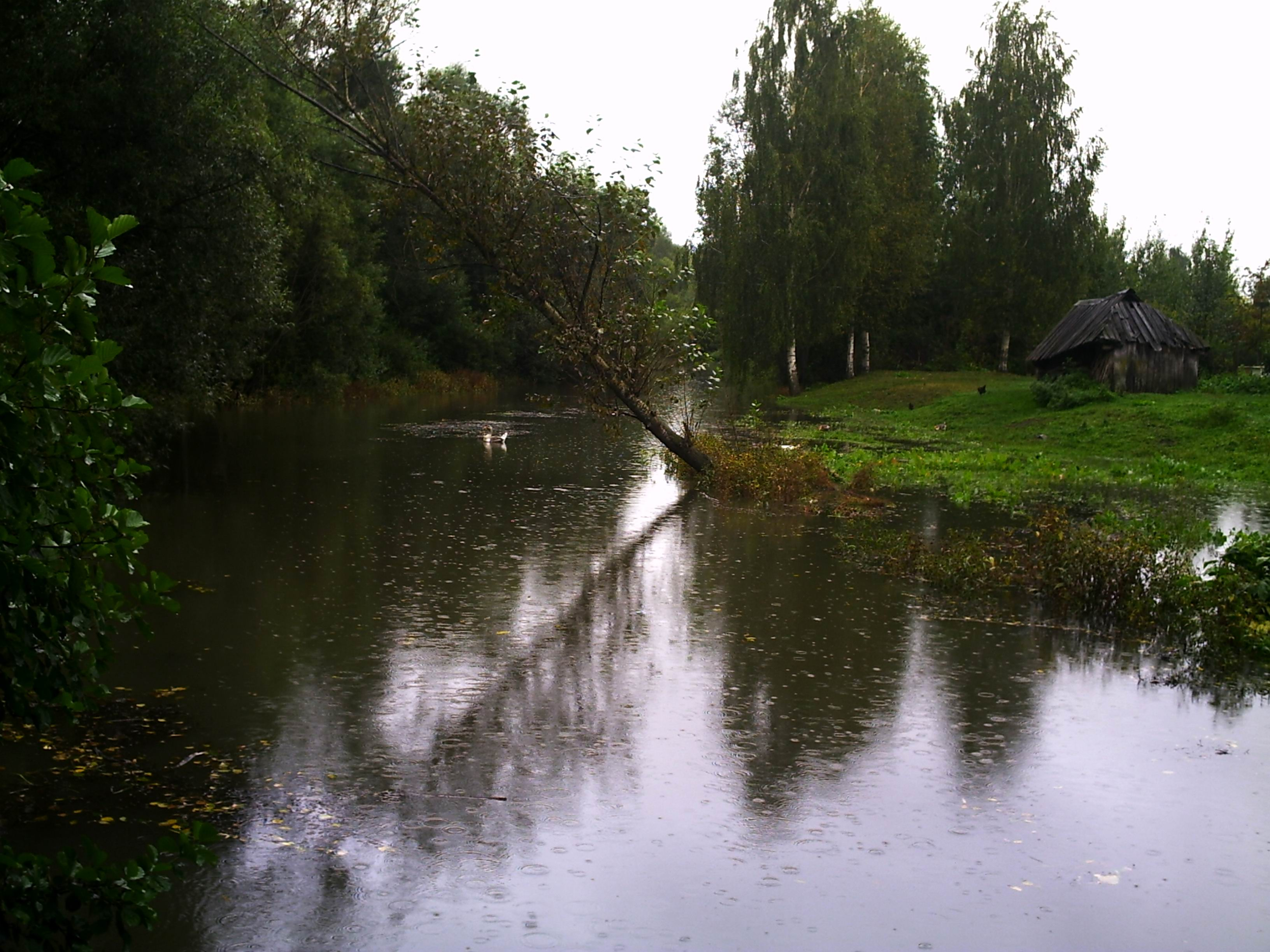 Рождествено. Вид со "школьного" моста на разлившуюся после дождя речку.